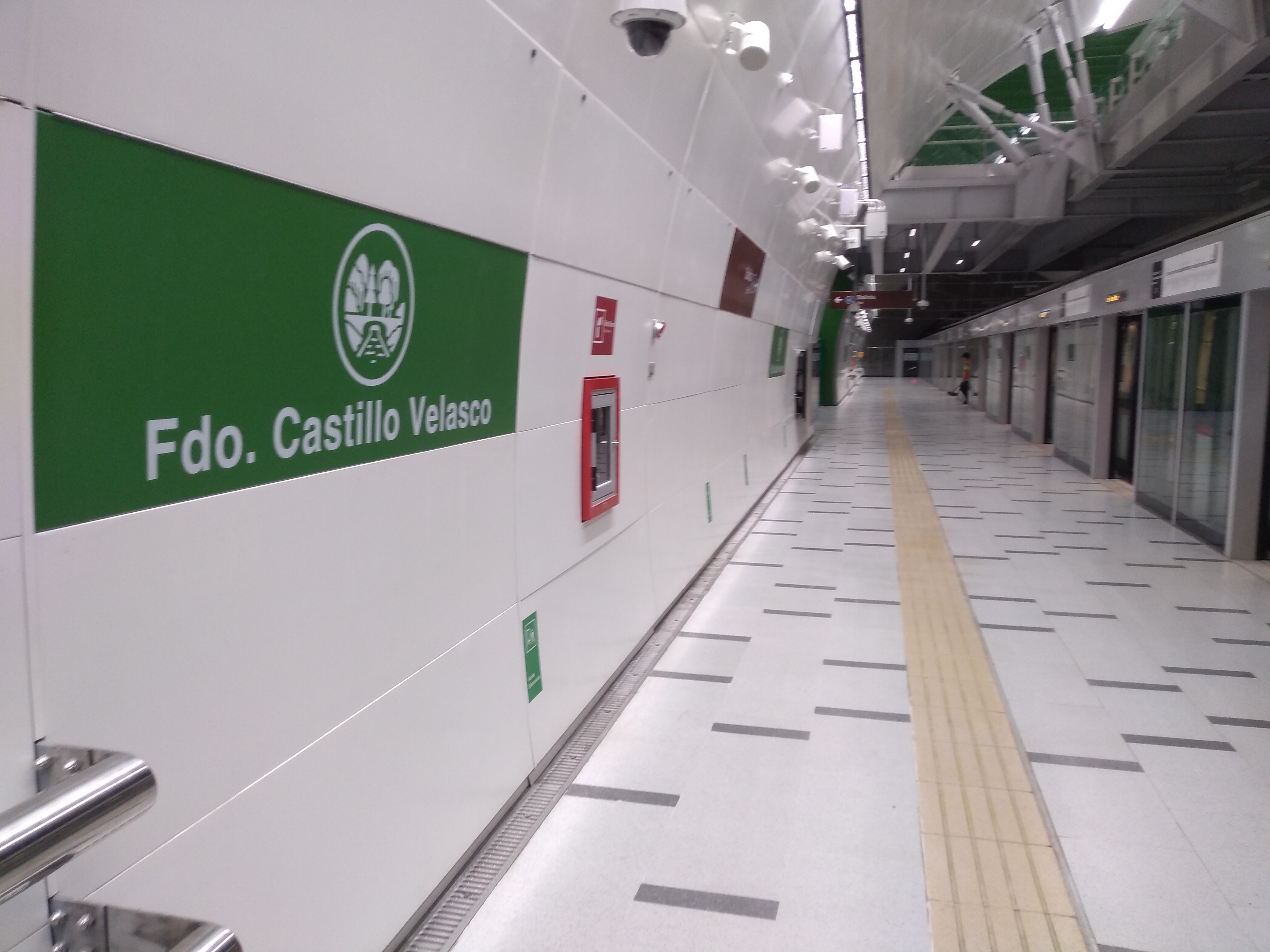 Estación Fernando Castillo Velasco